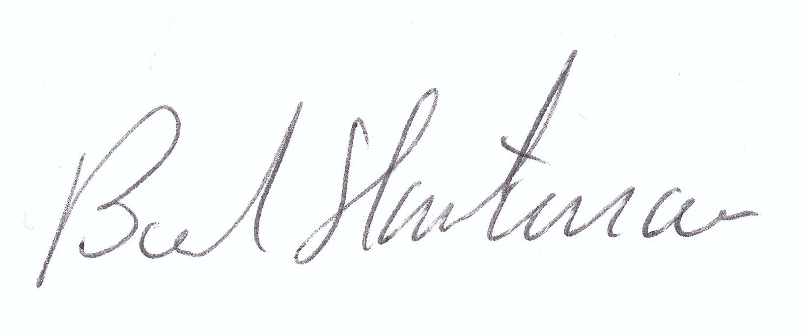 Autogramm des ehem. Bundesliga-Torwarts von 1978